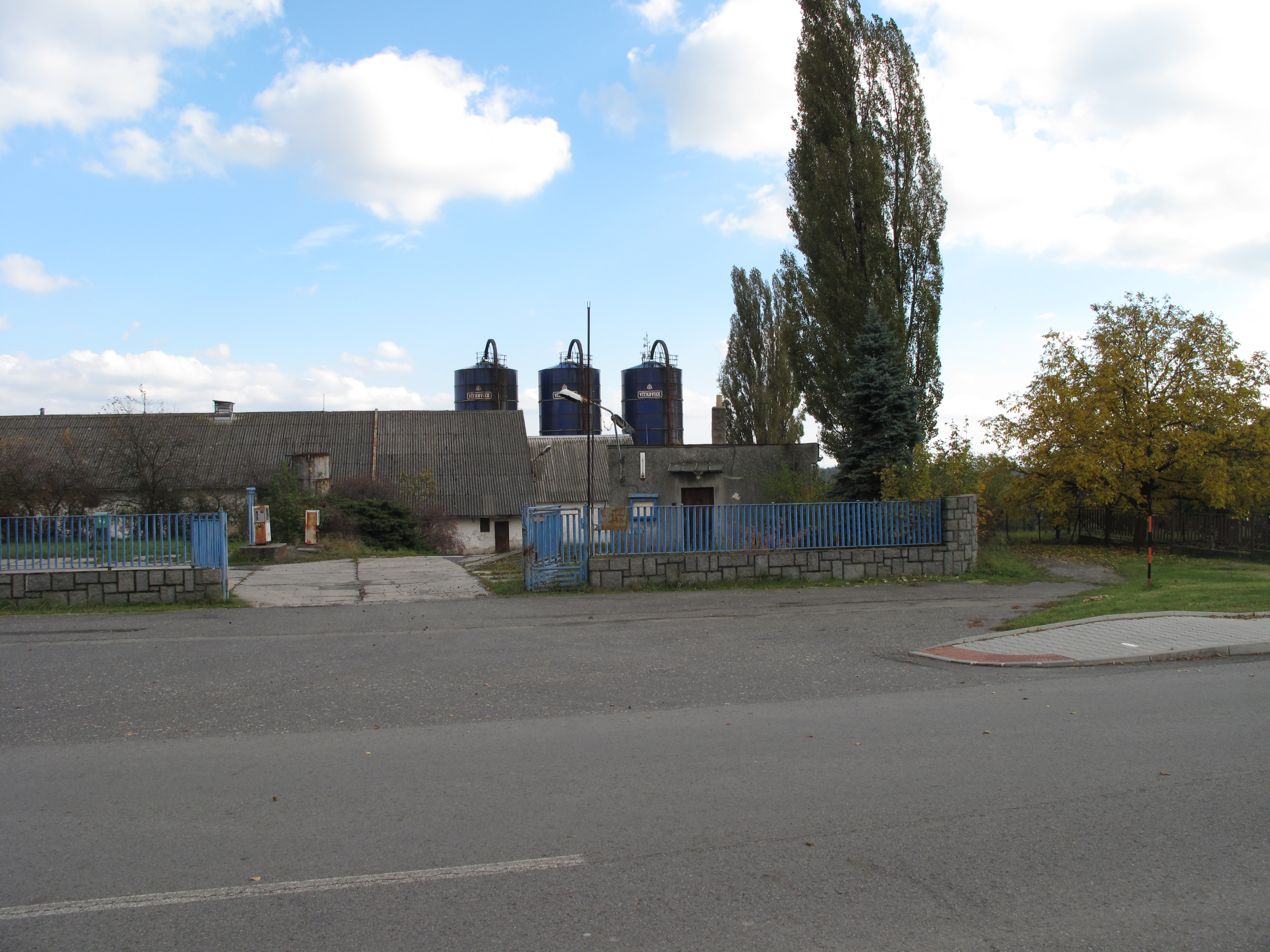 Budišovice. Okres Opava, Česká republika.